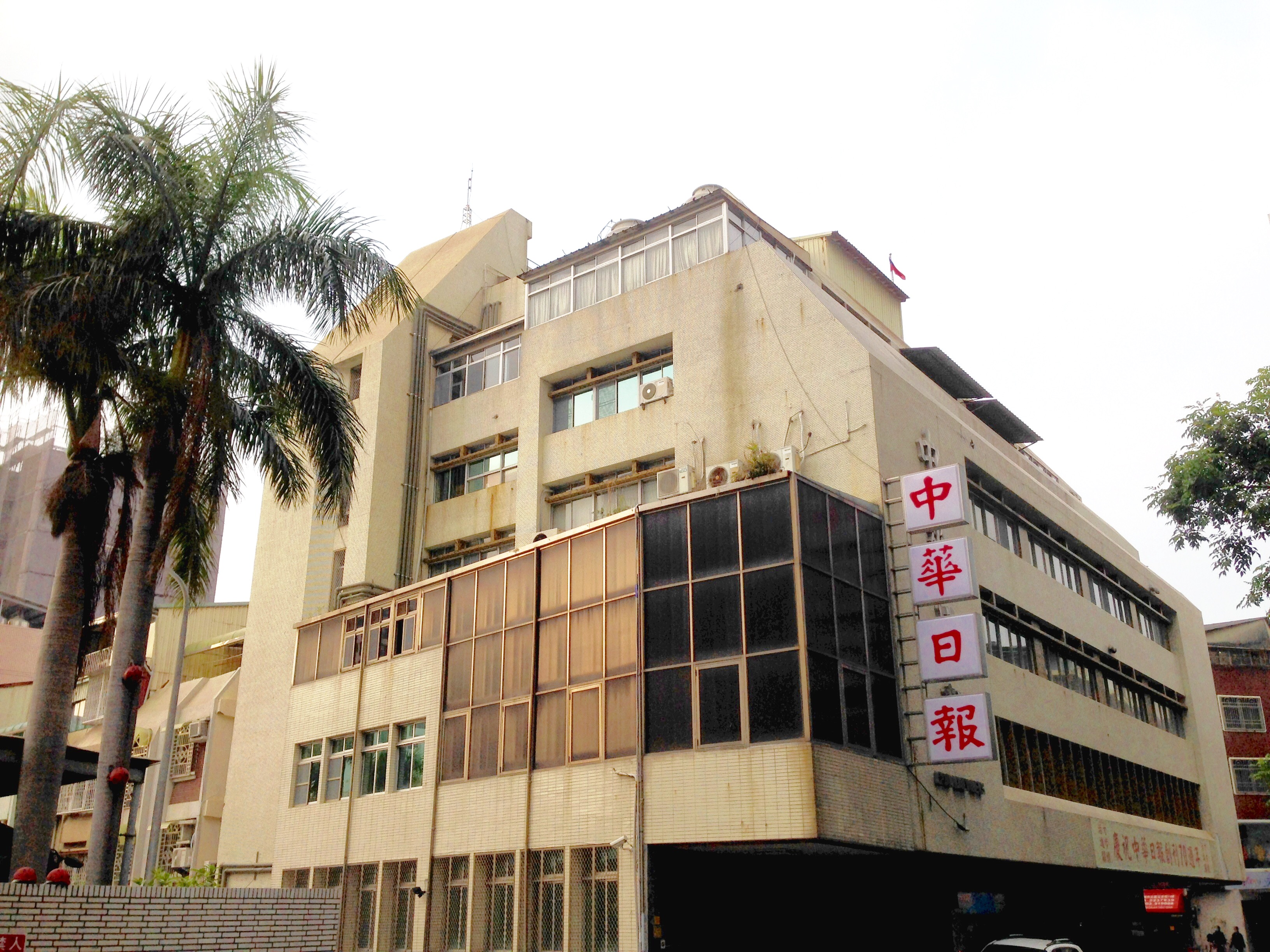 中華日報總部